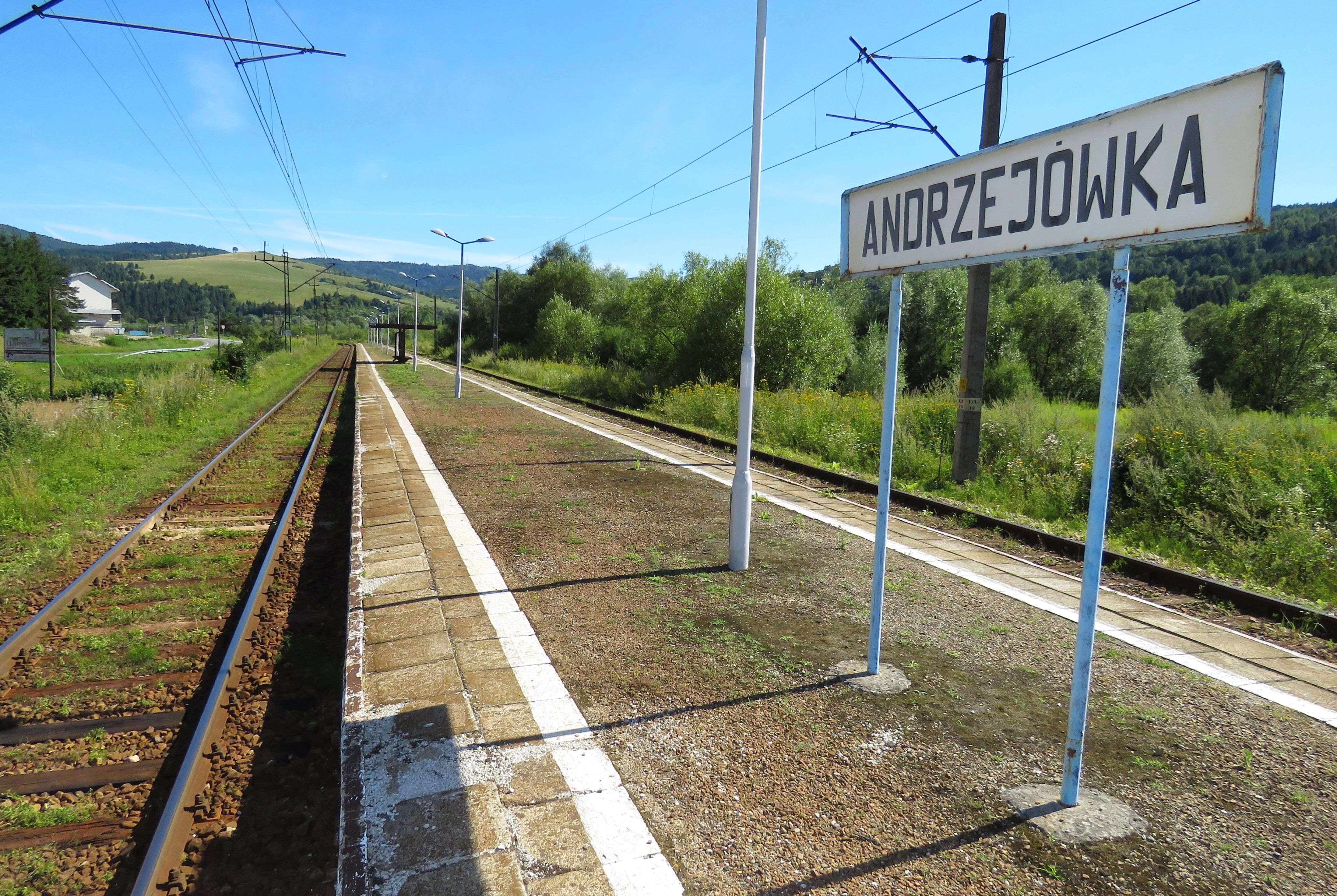 Przystanek kolejowy Andrzejówka